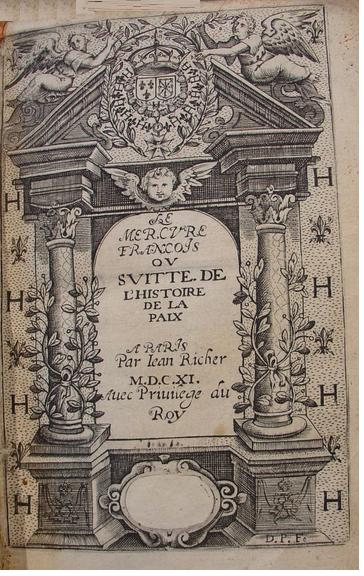 Le Mercure françois ou la Suitte de l'histoire de la paix commençant l'an 1605 pour suite du Septénaire du D. Cayer, et finissant au sacre du très grand Roy de France et de Navarre Louis XIII - First published in 1611 by Jean Richer (Paris).